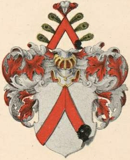 Glasenappi suguvõsa aadlivapp